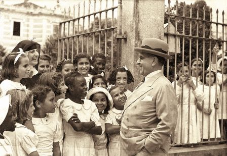 Getúlio Vargas em visita à Porto Velho (capital de Rondônia), quando ainda se encontrava como parte do Estado do Amazonas.